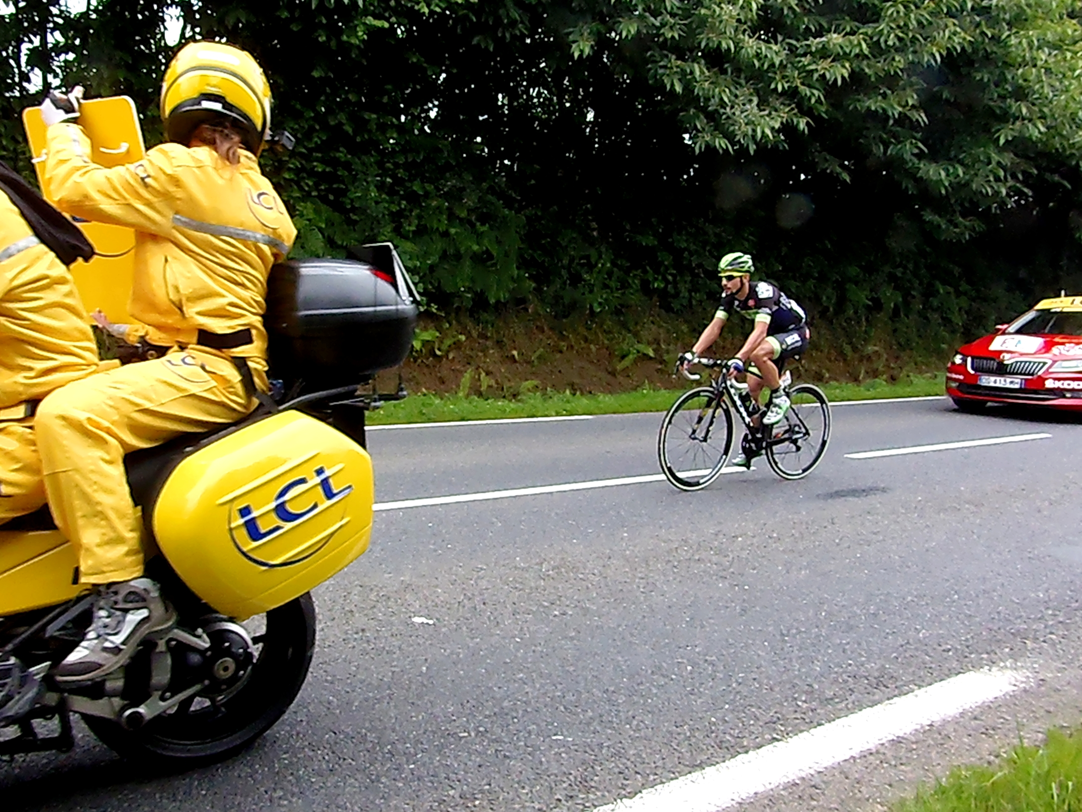 3e étape du Tour de France 2016, au Grand-Celland (km 44, Normandie, France). L'échappé : Armindo Fonseca.